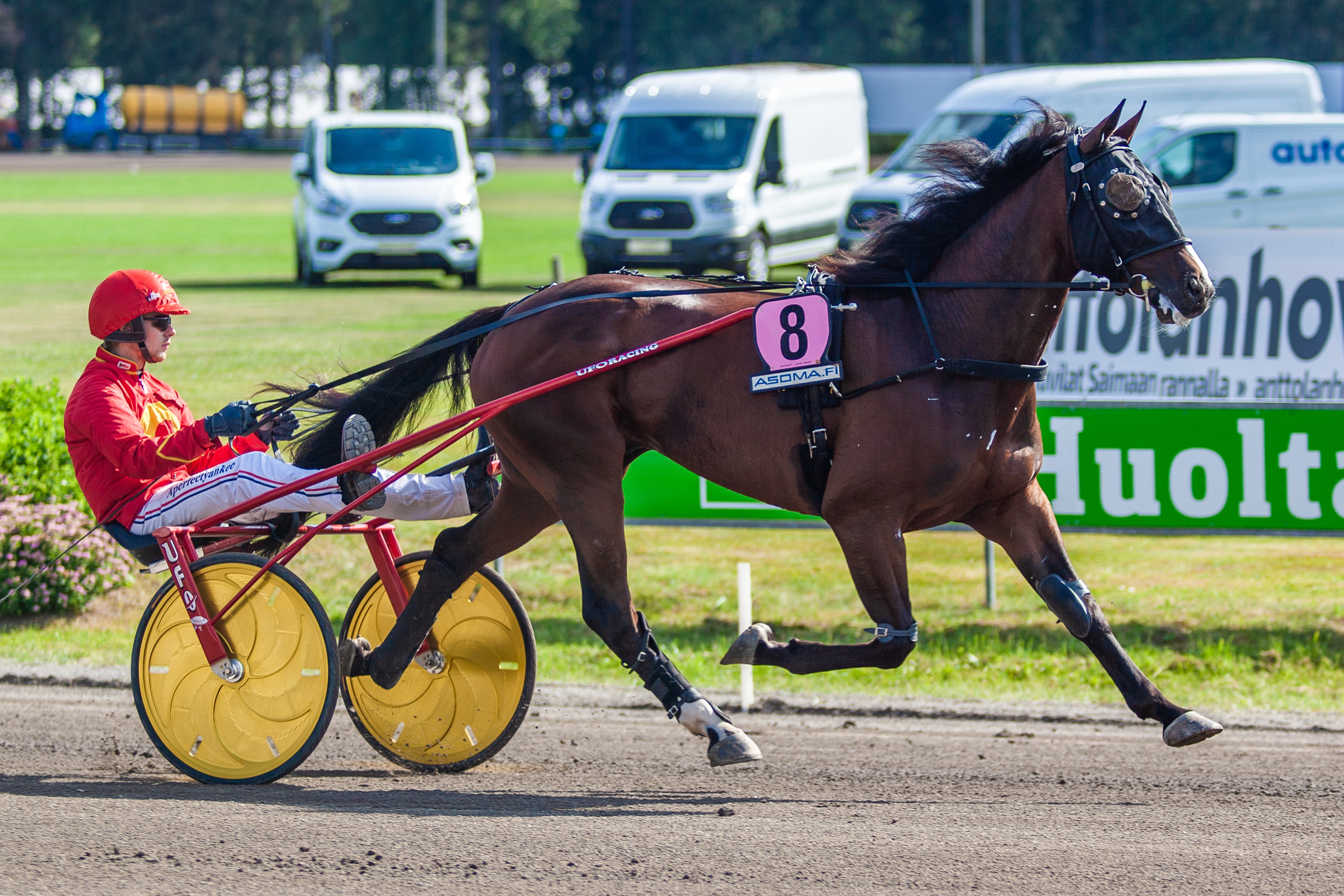 Disco Volante and Kevin Oscarsson at Mikkeli 21.7.2019